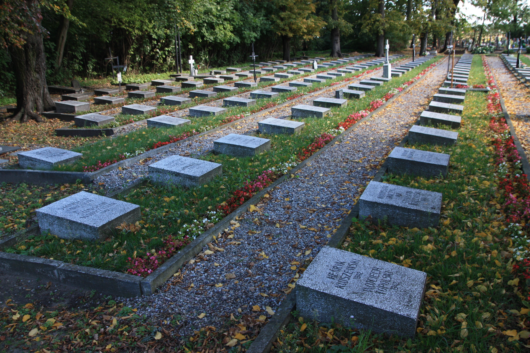 Inowrocław, ul. Marulewska - cmentarz rzymskokatolicki parafialny pw. św. Mikołaja (zabytek A/246)